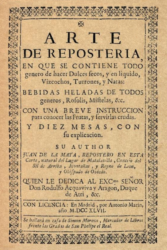 Portada del libro "Arte de repostería". Publicado en la madrileña imprenta de Antonio Marín por Juan de la Mata en 1747.